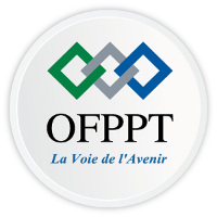 Logo de l'OFPPT